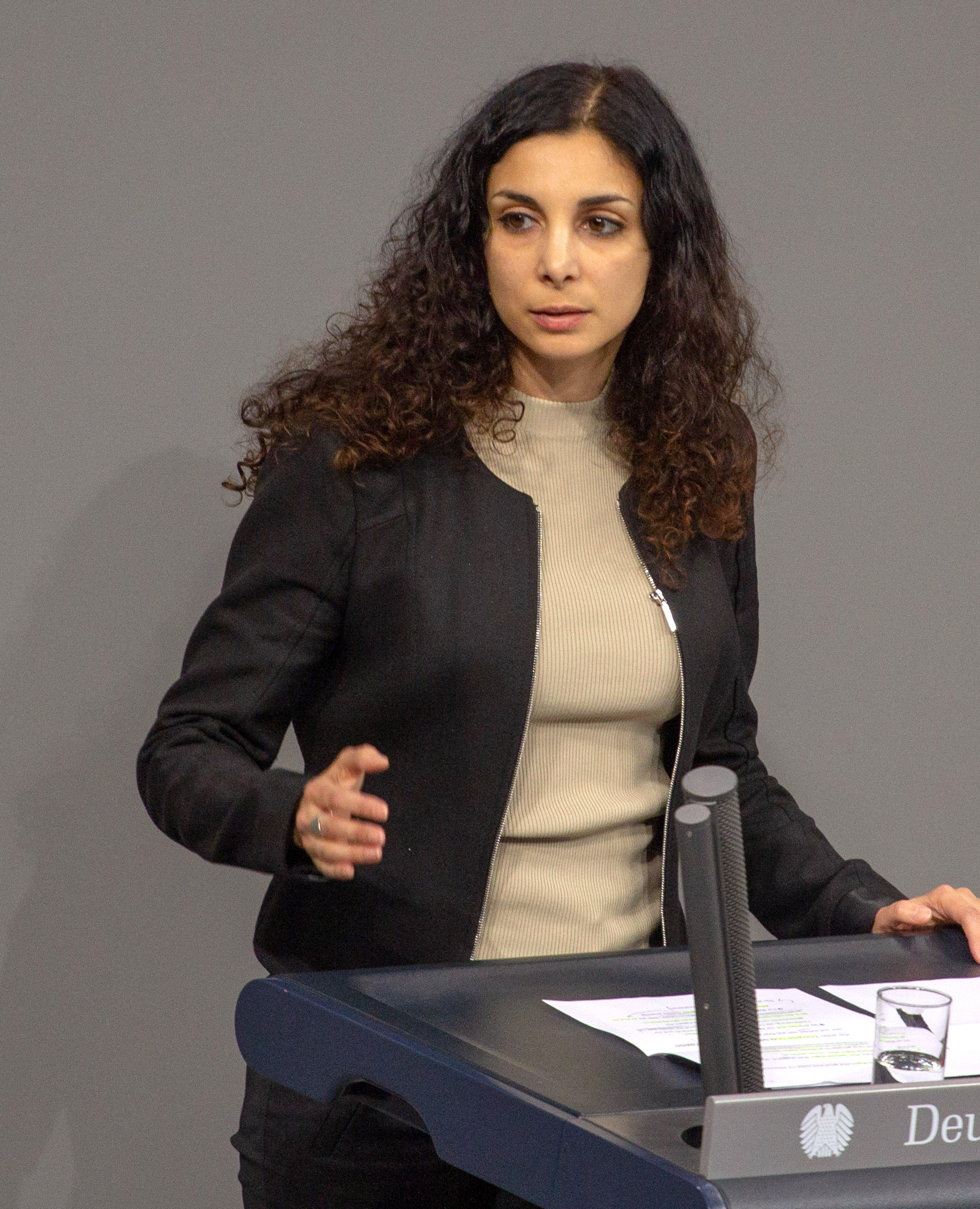 Jessica Tatti, Mitglied des Deutschen Bundestages, während einer Plenarsitzung am 11. April 2019 in Berlin.